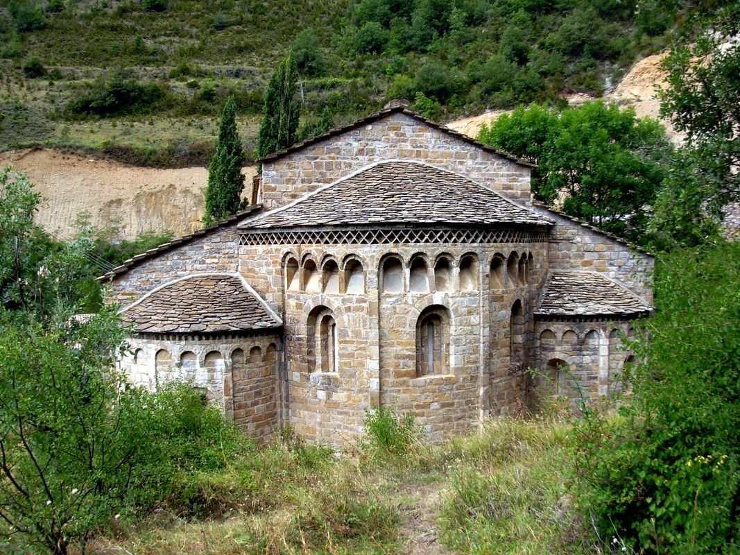 Vista dels àbsis